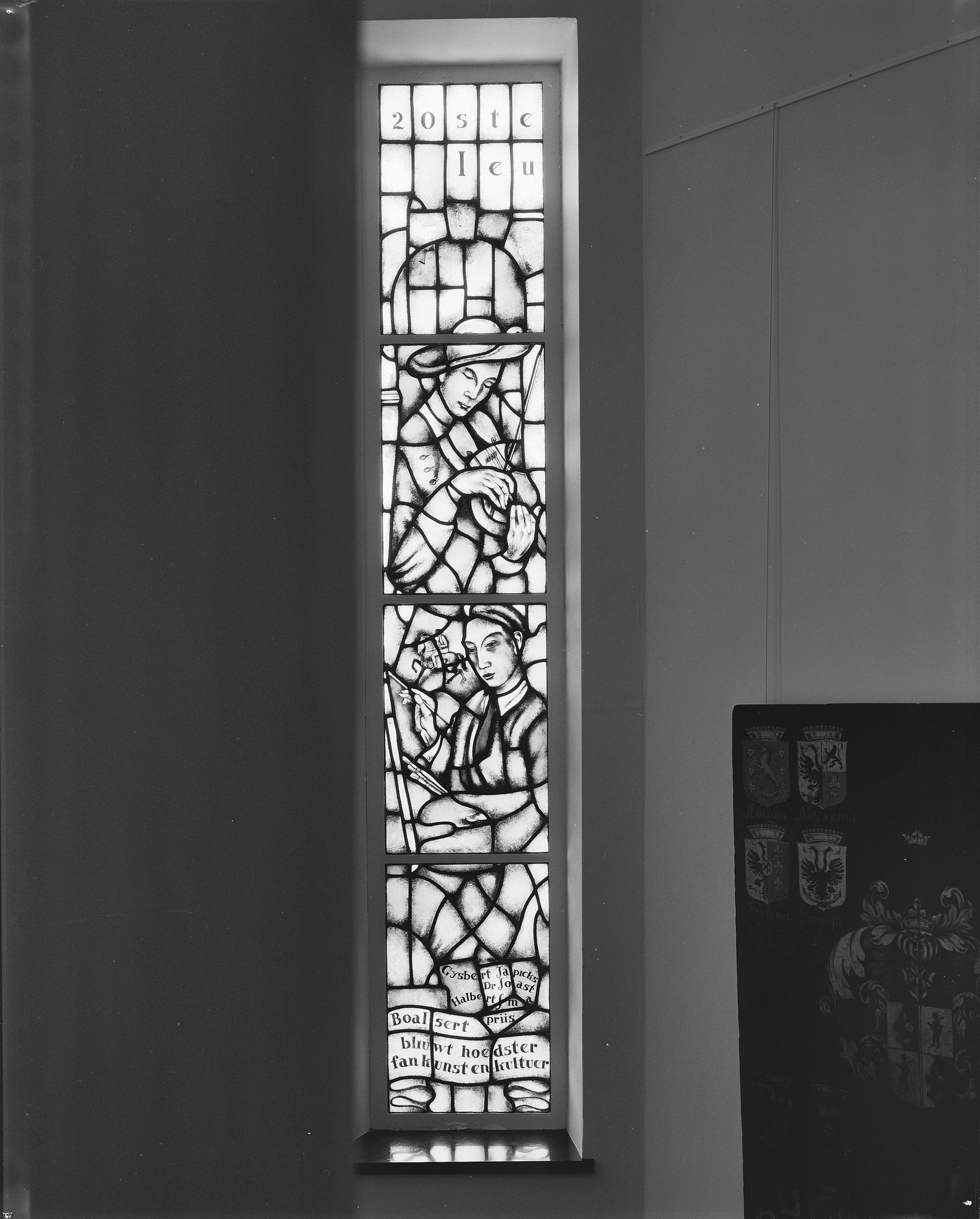 STADHUIS: INTERIEUR, GLAS IN LOODRAAM (VIJFDE RAAM VANAF RECHTS) MUZIEK EN SCHILDERKUNST VAN COR REISMA (RBK)